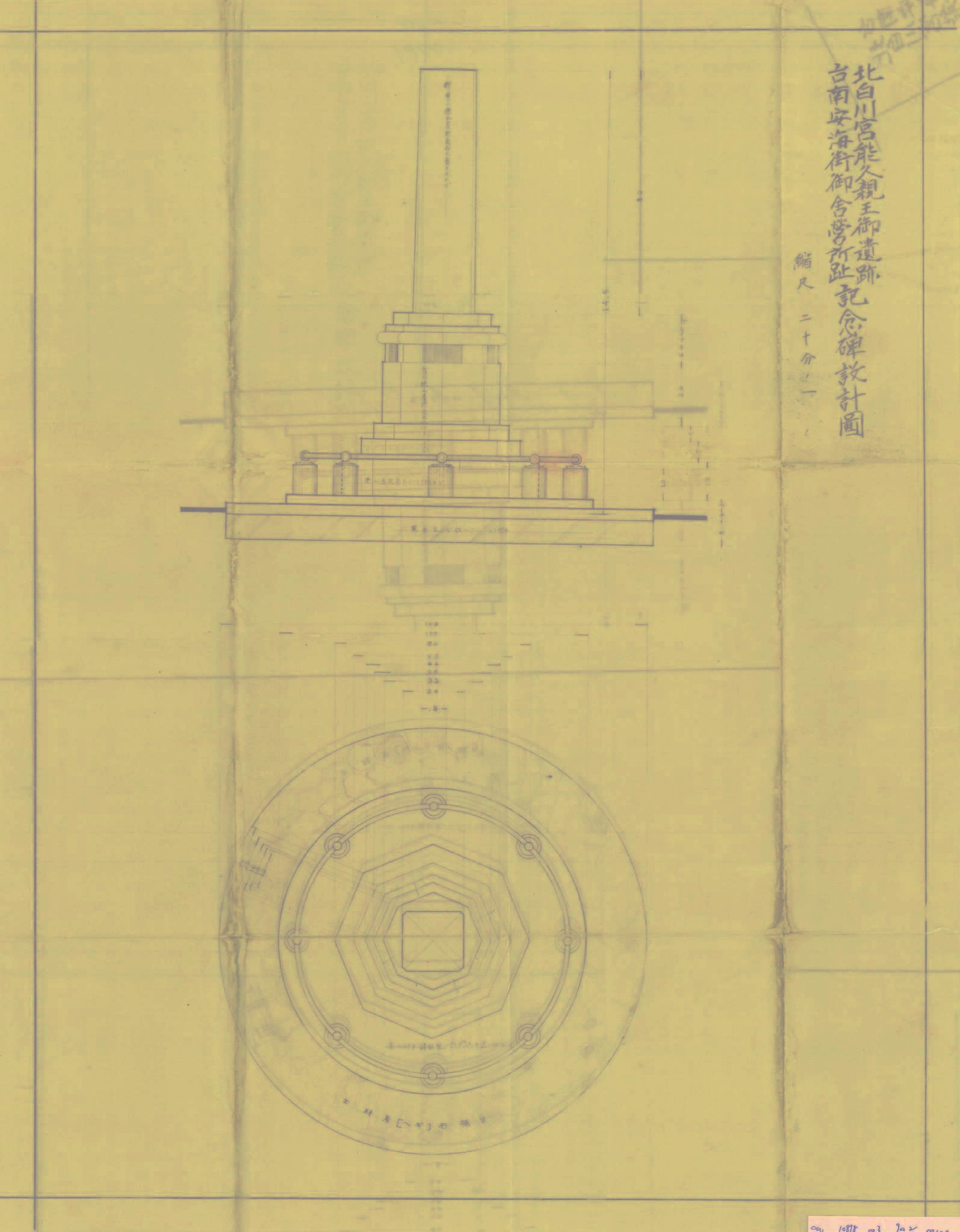 中文（台灣）: 此記念碑位於台南安海街御舍營所址北側的三角窗空地，戰後拆除